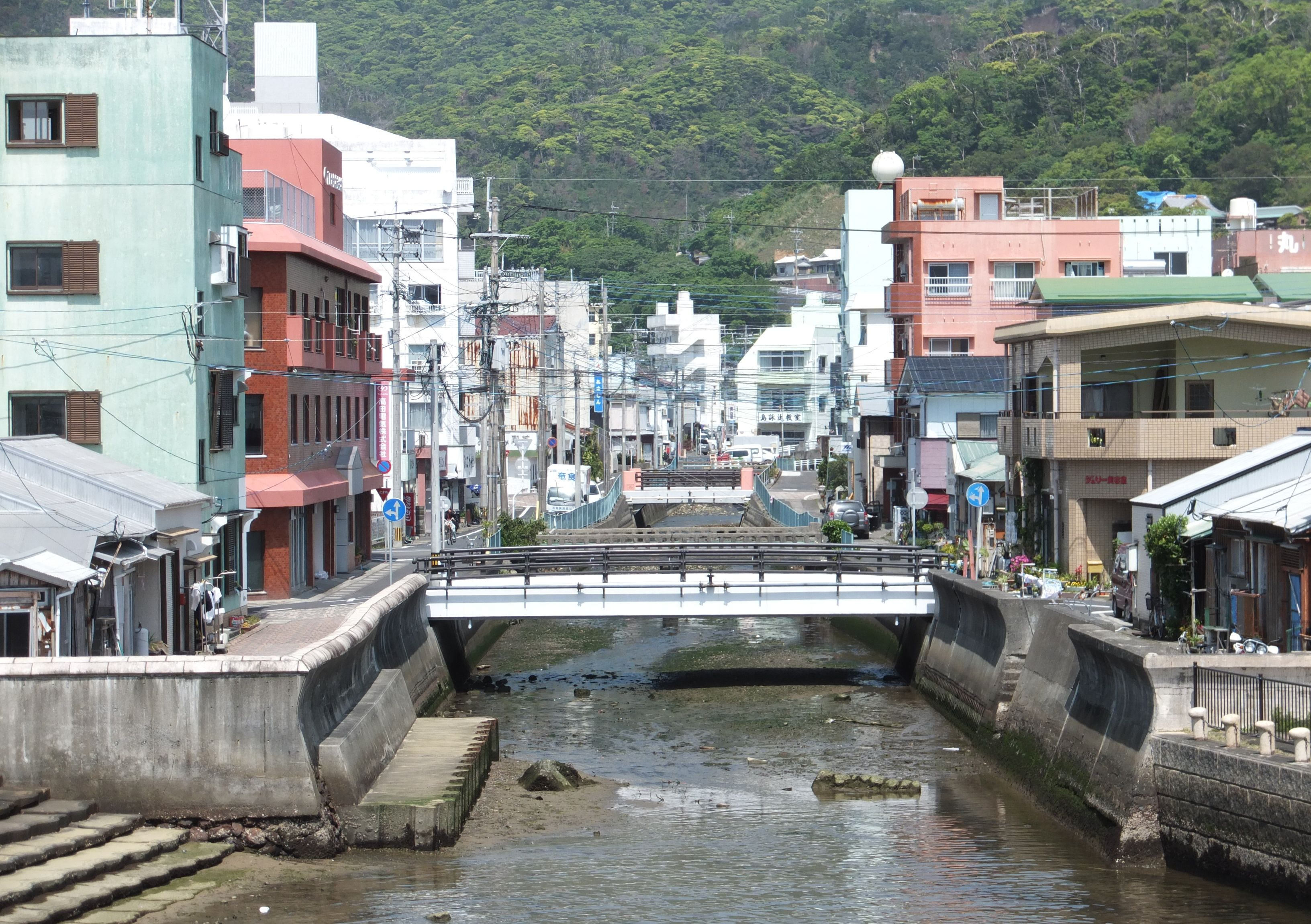 瀬戸内町(古仁屋)中心部